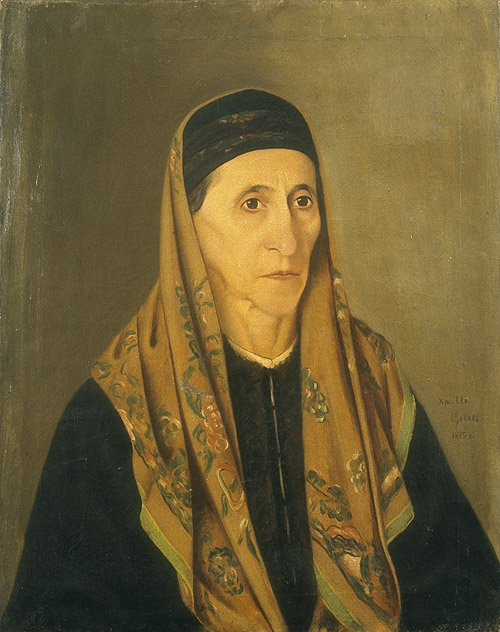 Портрет на Ивана Ненова-Каролева. Тя е майка на просветния деец и политик от Габрово Райчо Каролев